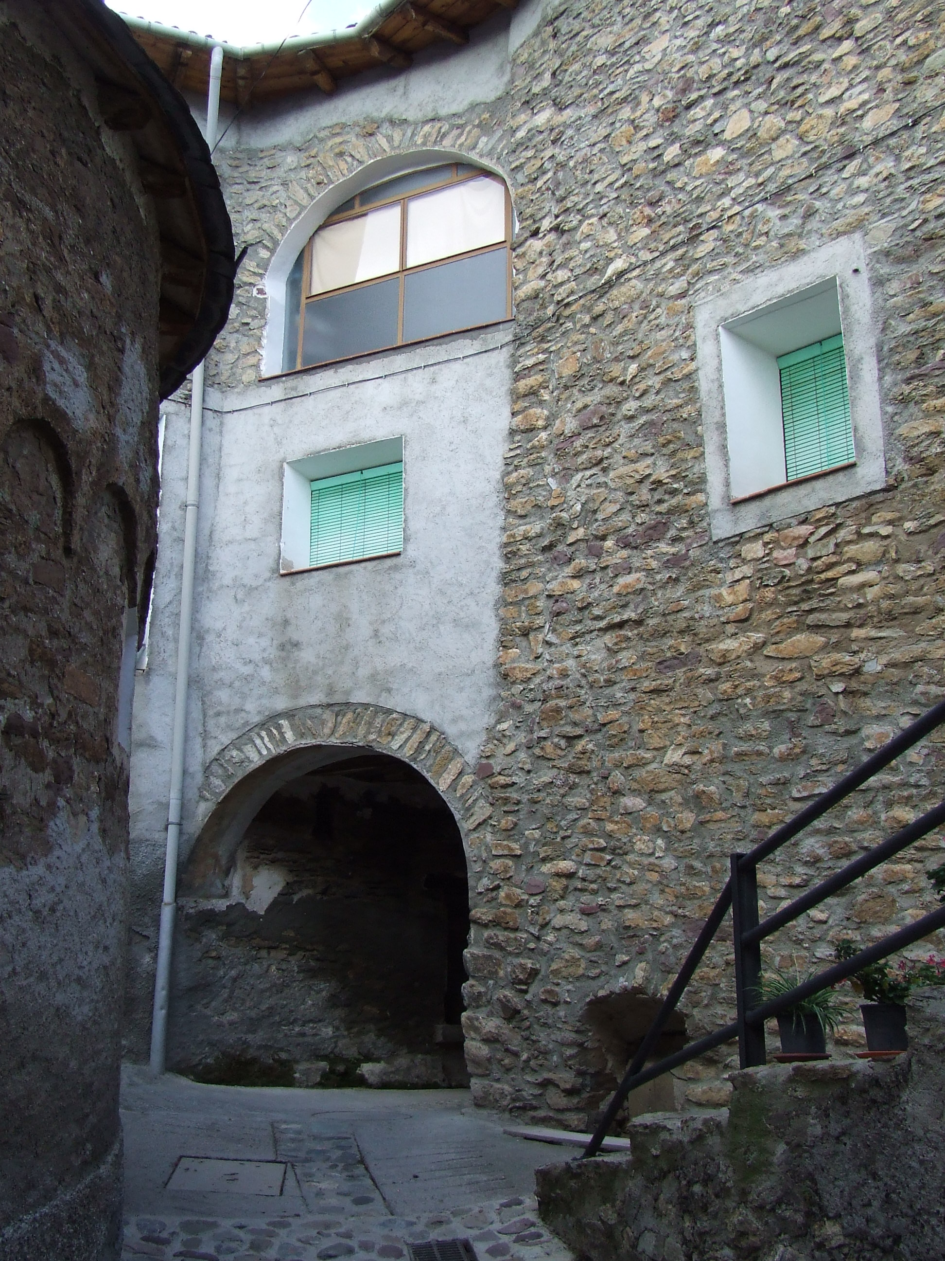 Portal interior d'Oveix (la Torre de Cabdella, Pallars Jussà)